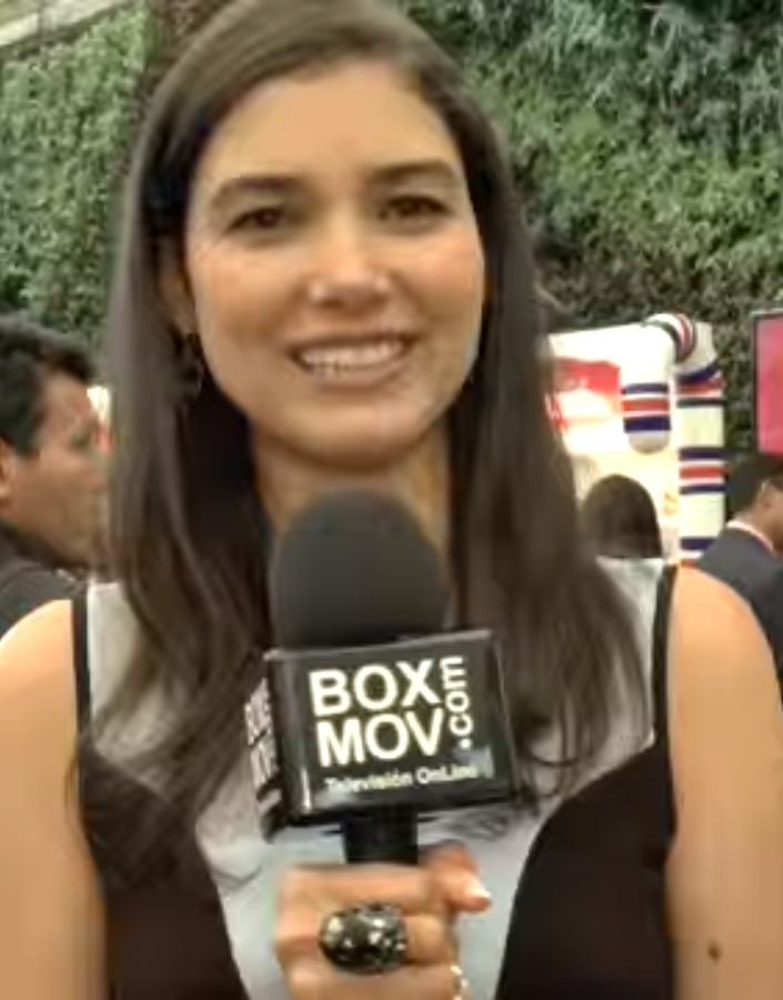 Abril Schreiber en 2015